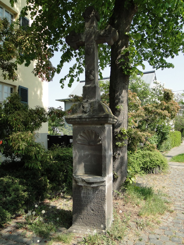 Das Wegekreuz (Gemeindekreuz) wurde 1705 errichtet und befindet sich an der Ecke Hamm- und Geislarstraße. Inschrift: Im oberen Teil des Kreuzsockels: IM (Steinmetz-Initialen oder Jesus, Maria; Im unteren Teil des Kreuzsockels: Leerer Wappenschild, ANNO 1705 HABEN ZV EHREN GOTTES DIES CREVTS AVFGERICHTET DIE GEMEINDE ZV GEISLAHR VND PETER POLL HAVSHALFEN